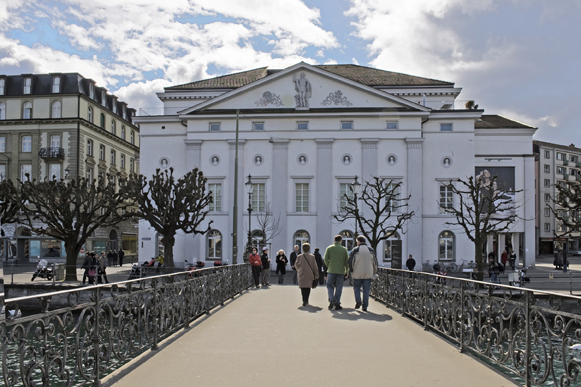 Das Luzerner Theater von der Rathausbrücke gesehen